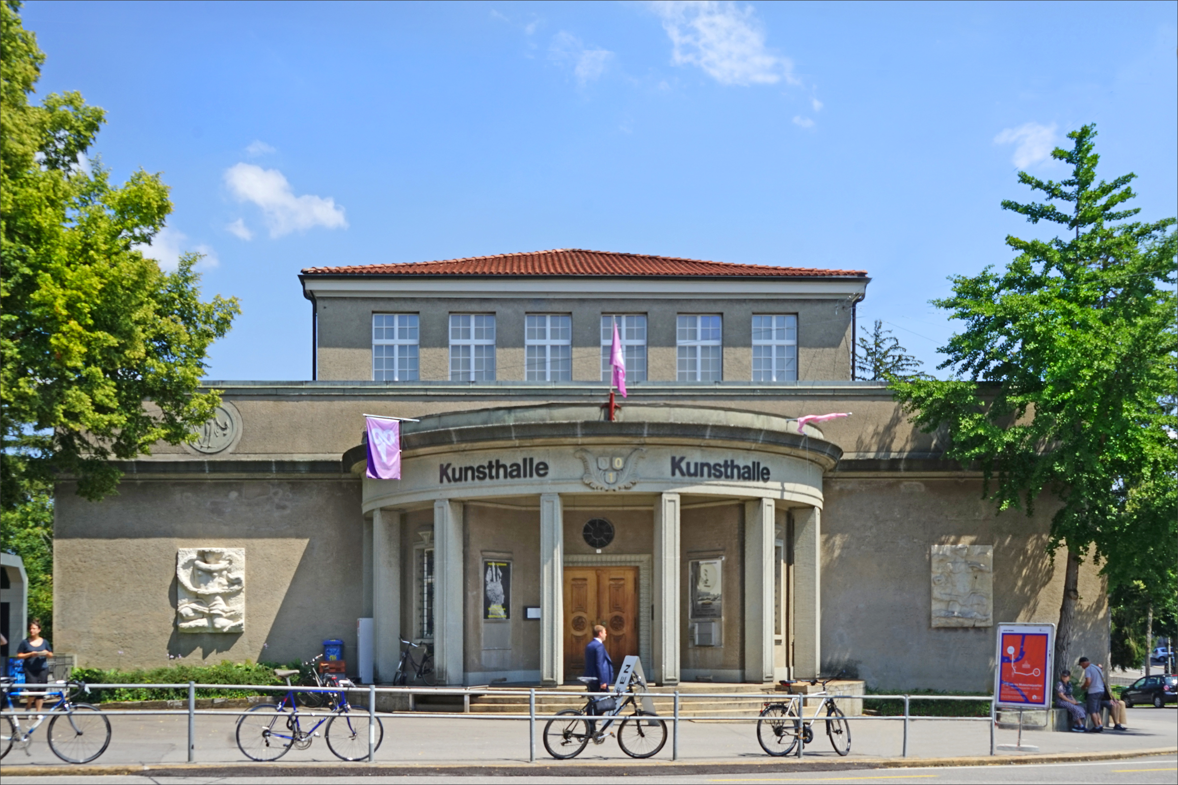 Façade du bâtiment de la Kunsthalle à Berne La Kunsthalle a été construite entre 1917 et 1918 par une association d'art de la ville de Berne. Elle fut inaugurée le 5 octobre 1918, et est devenue au fil des années, (malgré sa petite taille NDLR) un important centre d'exposition d'art moderne et d'art contemporain.... extraits de Wikipedia La Kunsthalle a été célèbre dans le monde de l'art contemporain à la suite des expositions d’avant garde artistique organisées par Harald Szeemann (1933-2005) qui en a été le directeur de 1961 à 1969. Parmi celles-ci, figure l'exposition culte "Vivre dans sa Tête. Quand les attitudes deviennent forme" (Live in Your Head. When Attitudes become Form) qui a présenté en 1969 des oeuvres d'art conceptuel d'artistes encore peu connus à l’époque. Cette exposition très radicale a été à l'origine d'un scandale qui a conduit Harald Szeemann à démissionner de son poste le 10 mai 1969, ce qui lui a ouvert une carrière internationale. Fait rarissime, la reconstitution exacte de cette exposition, avec une grande partie des œuvres d’origine, a été réalisée par la Fondation Prada à Venise en 2013 sous la direction du critique d’art Germano Celant (photo Dalbera) La Kunsthalle de Berne sur Wikipedia Site de la Kunsthalle de Berne en Suisse kunsthalle-bern.ch/